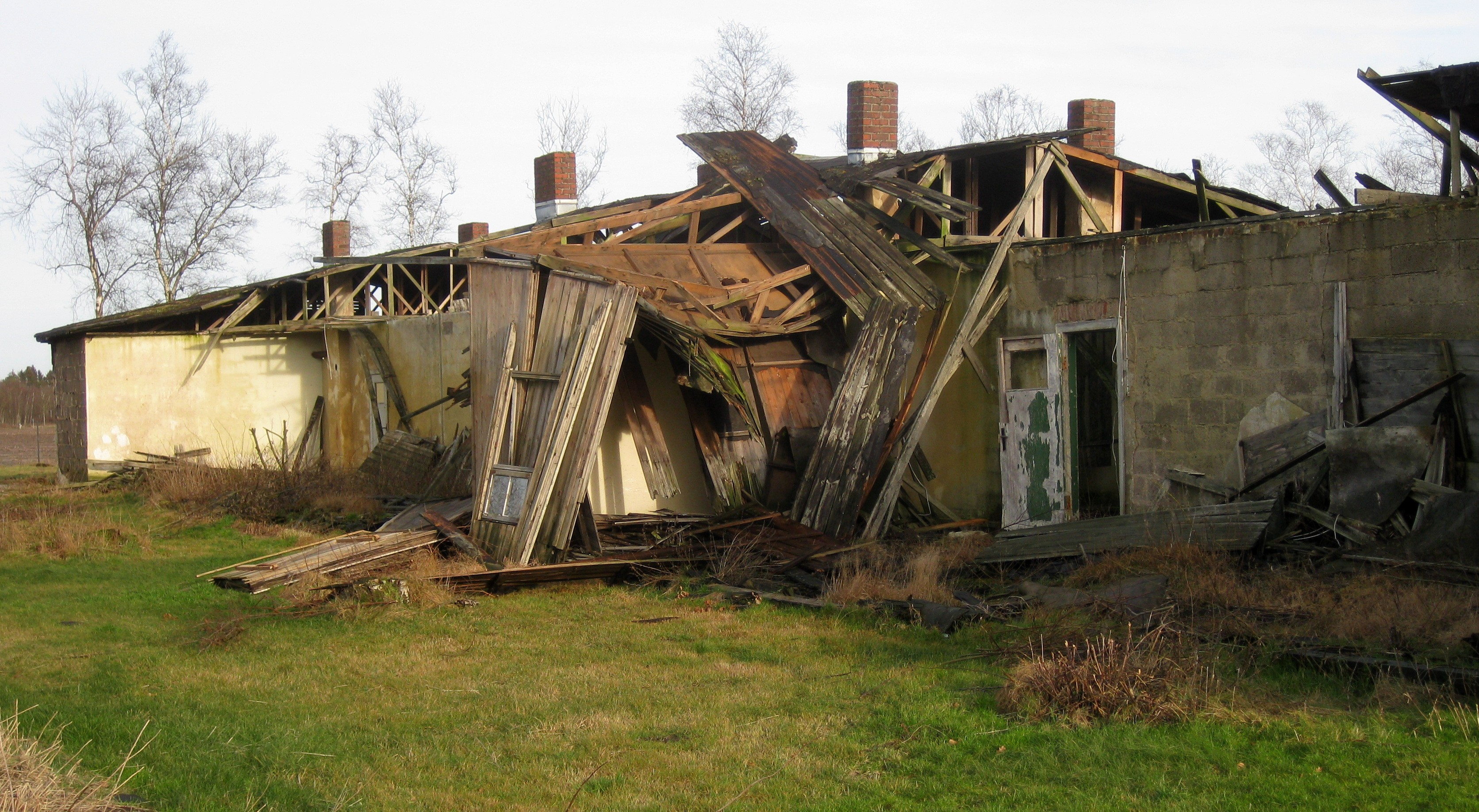 zerfallene Baracke im ehemaligen STALAG X B Sandbostel